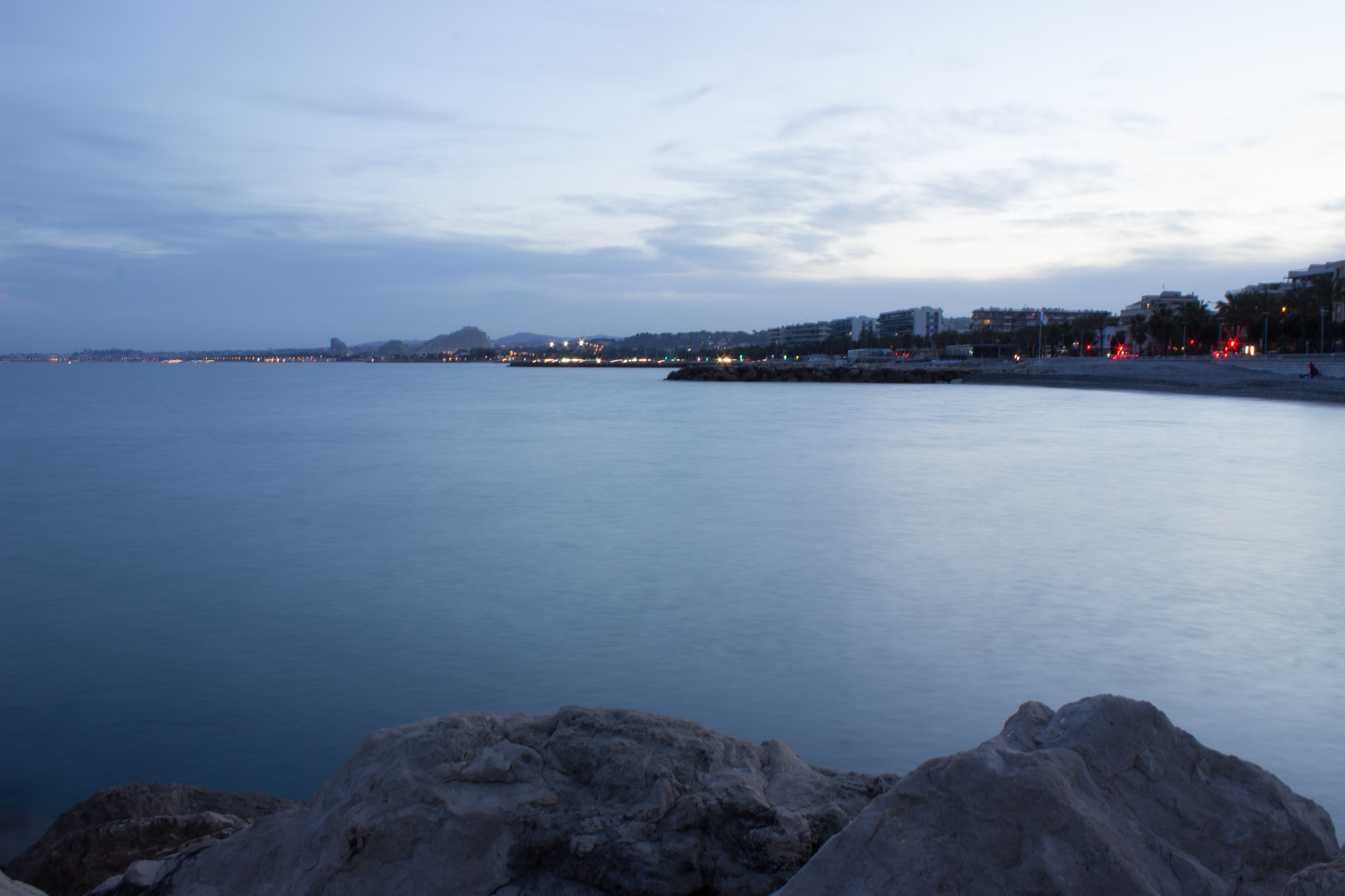 Villeneuve-Loubet et Cagnes-sur-Mer depuis la plage de Cagnes-Sur-Mer